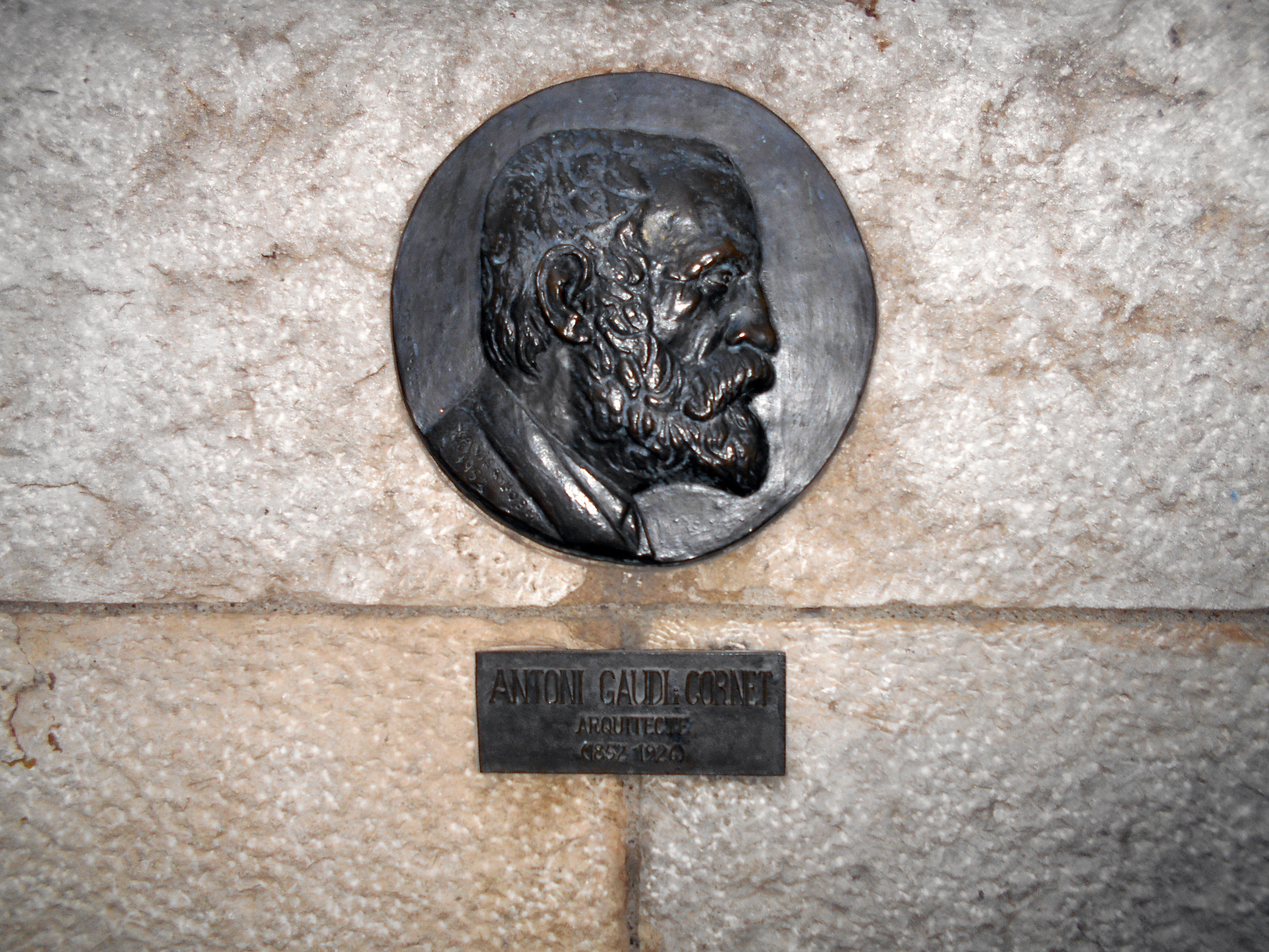 Medallón Antoni Gaudí, de Xavier Llobet (1952), avenida de Gaudí, Barcelona.